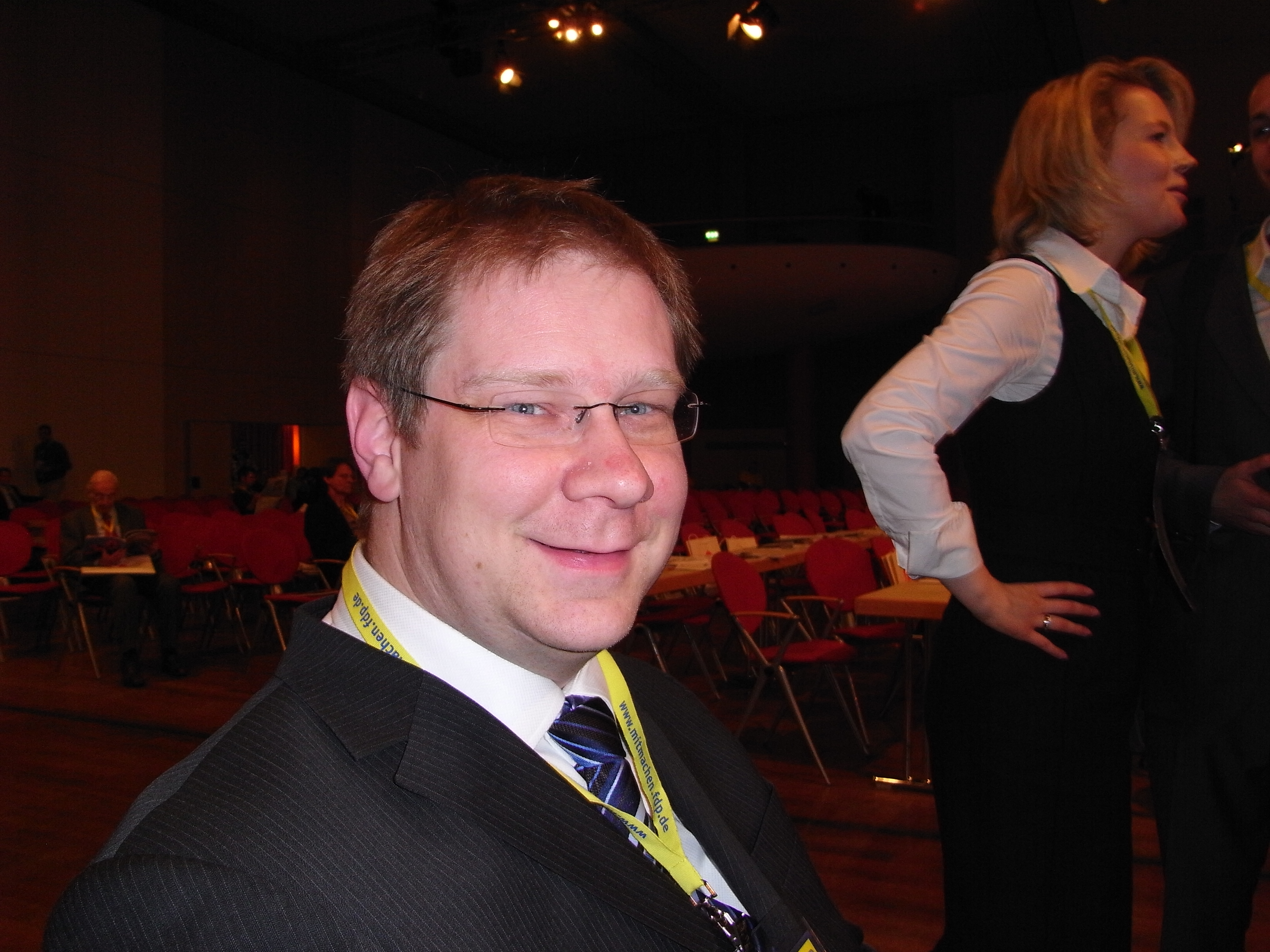 Andreas Büttner auf dem Europaparteitag 2009 der FDP